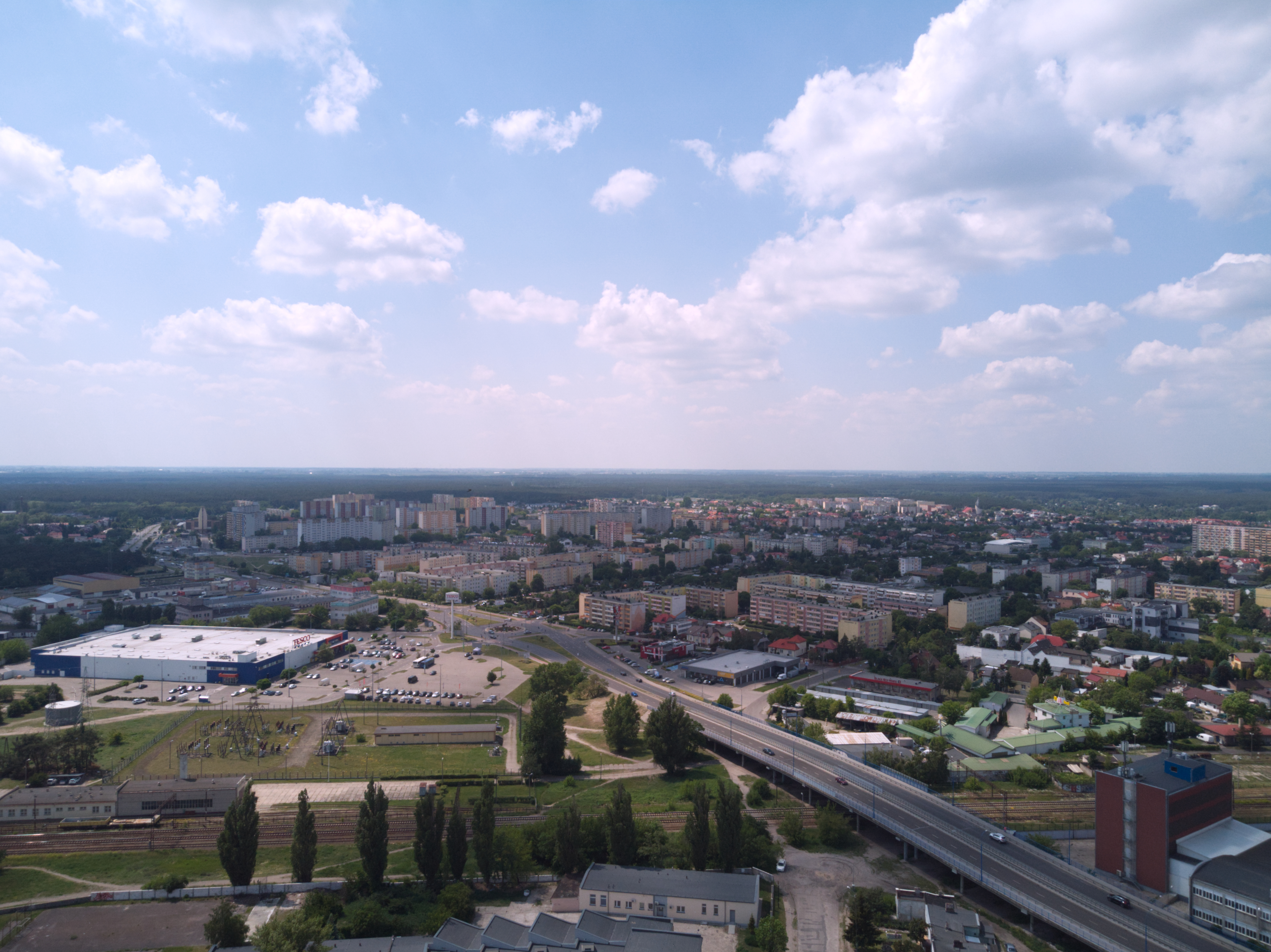 Dzielnica Południe z lotu ptaka (2020 r.)